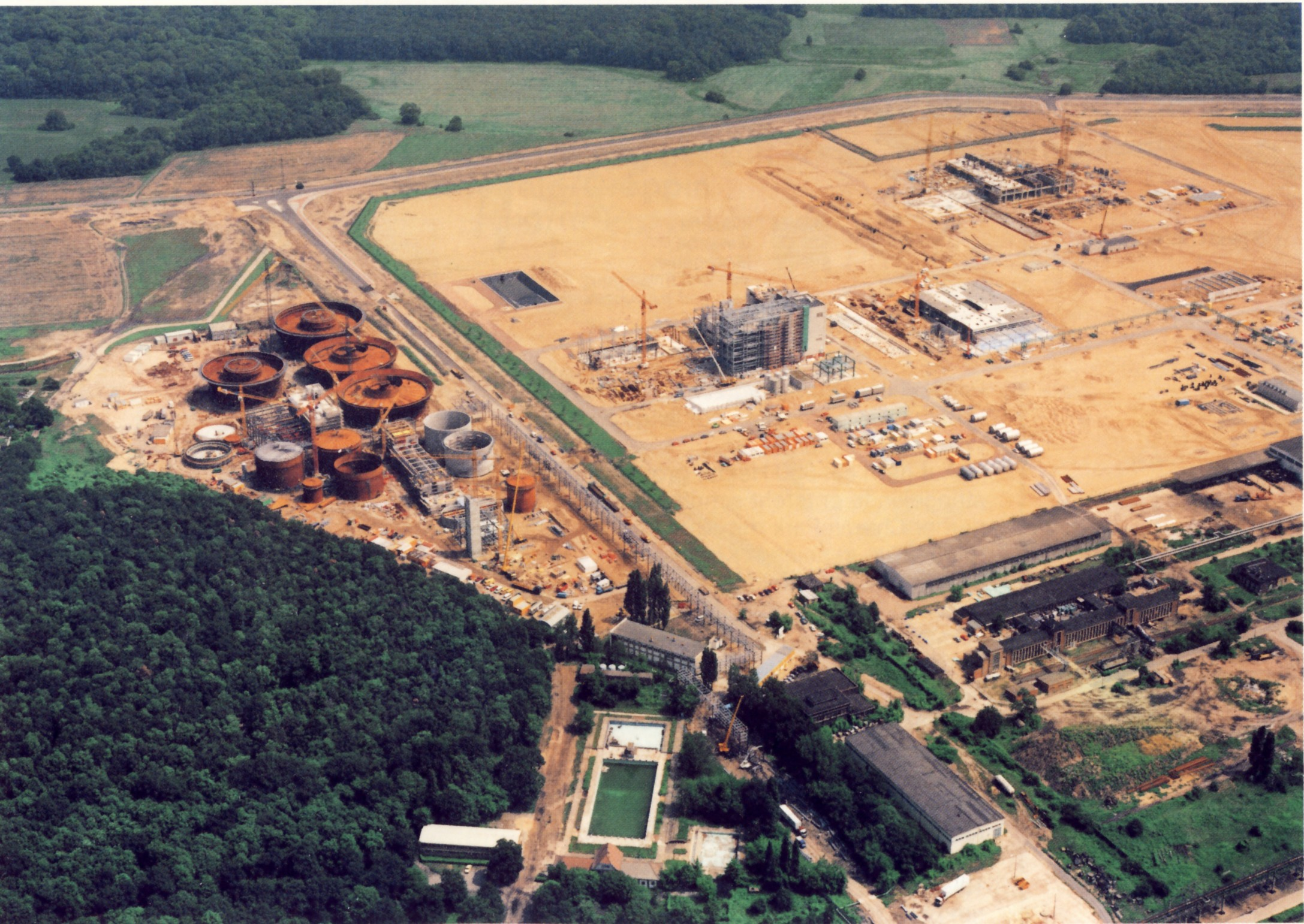 Bau des Gemeinschaftsklärwerks für den Chemiepark Bitterfeld-Wolfen